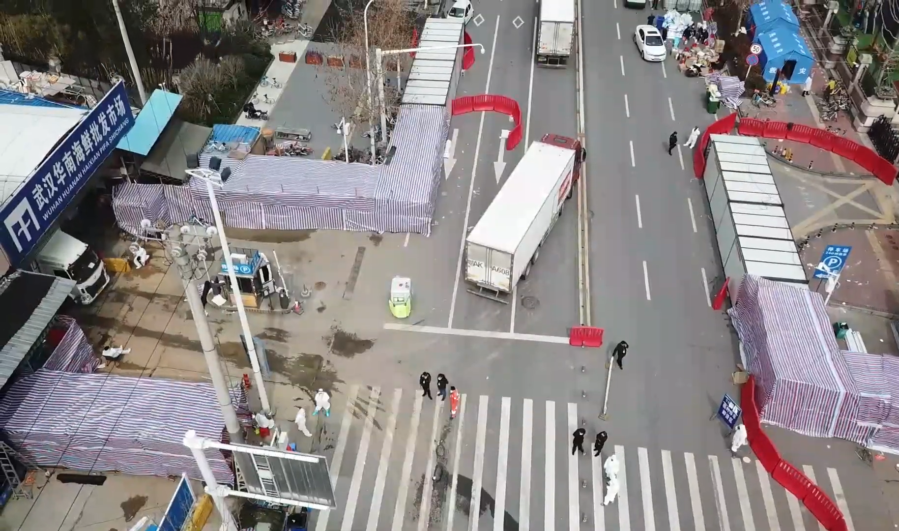 俯瞰武汉华南海鲜批发市场的正门和门前的道路。这一天是2020年3月4日，多支专业消杀队对武汉华南海鲜批发市场进行消杀作业。